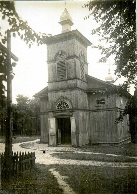 Nieistniejący kościół drewniany pw. św. Jakuba w Imielnicy.